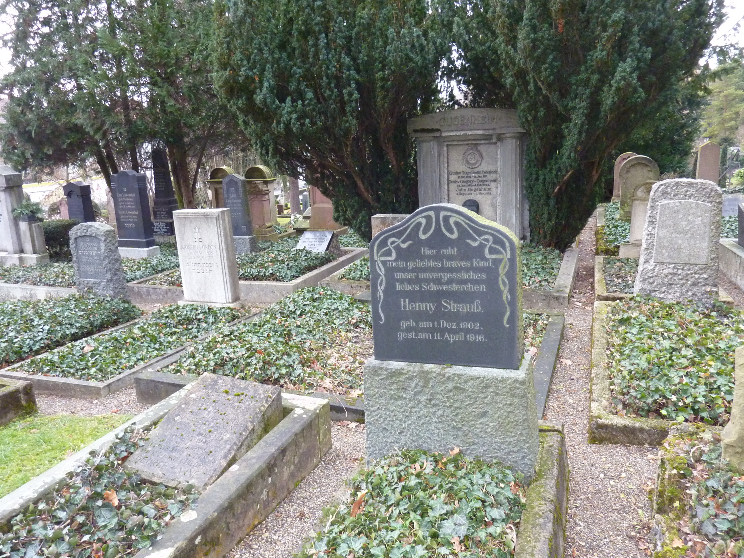 Gräber der Henny Strauß und anderer jüdischer Bestatteter